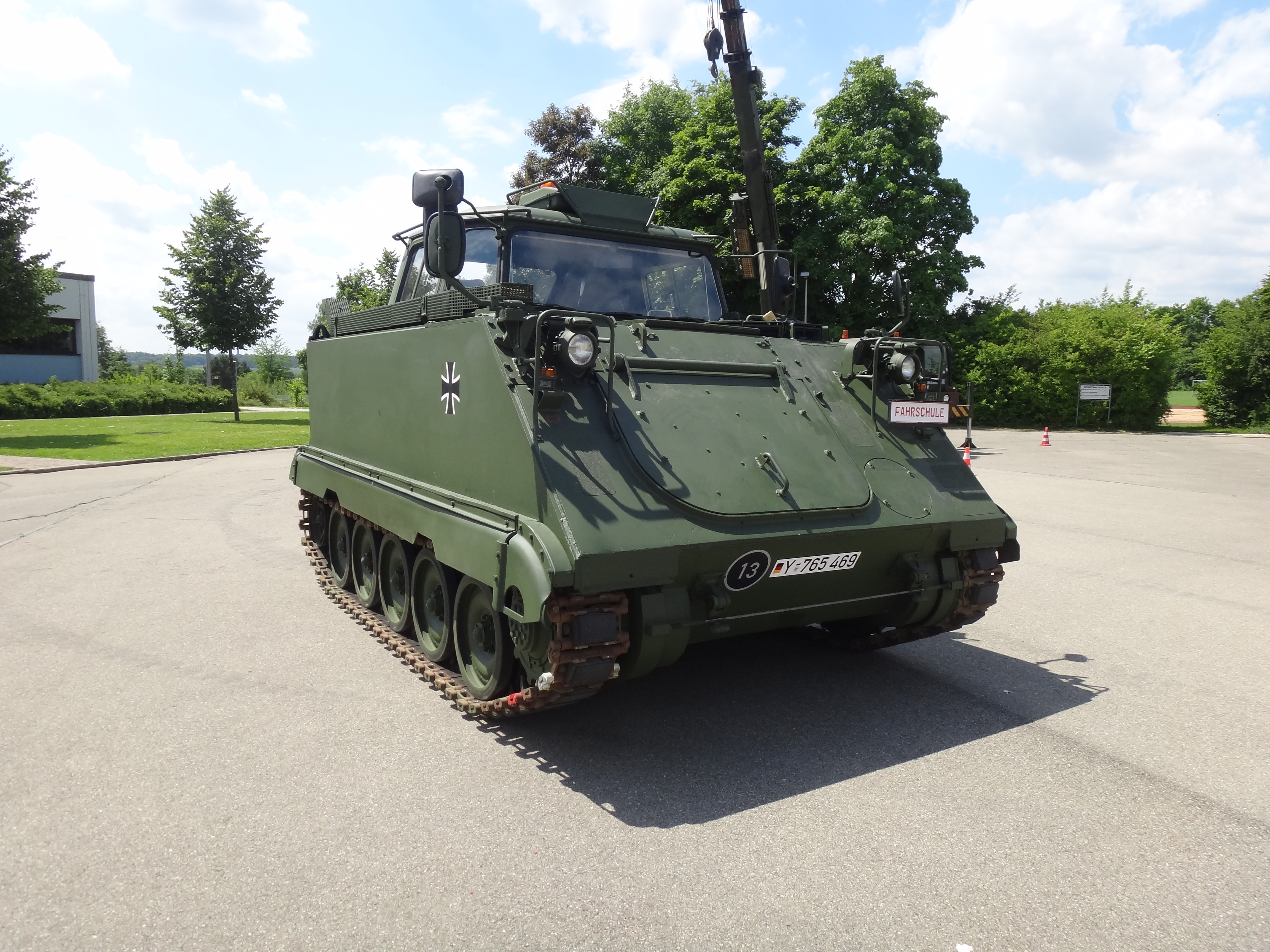 M113 Fahrschulpanzer